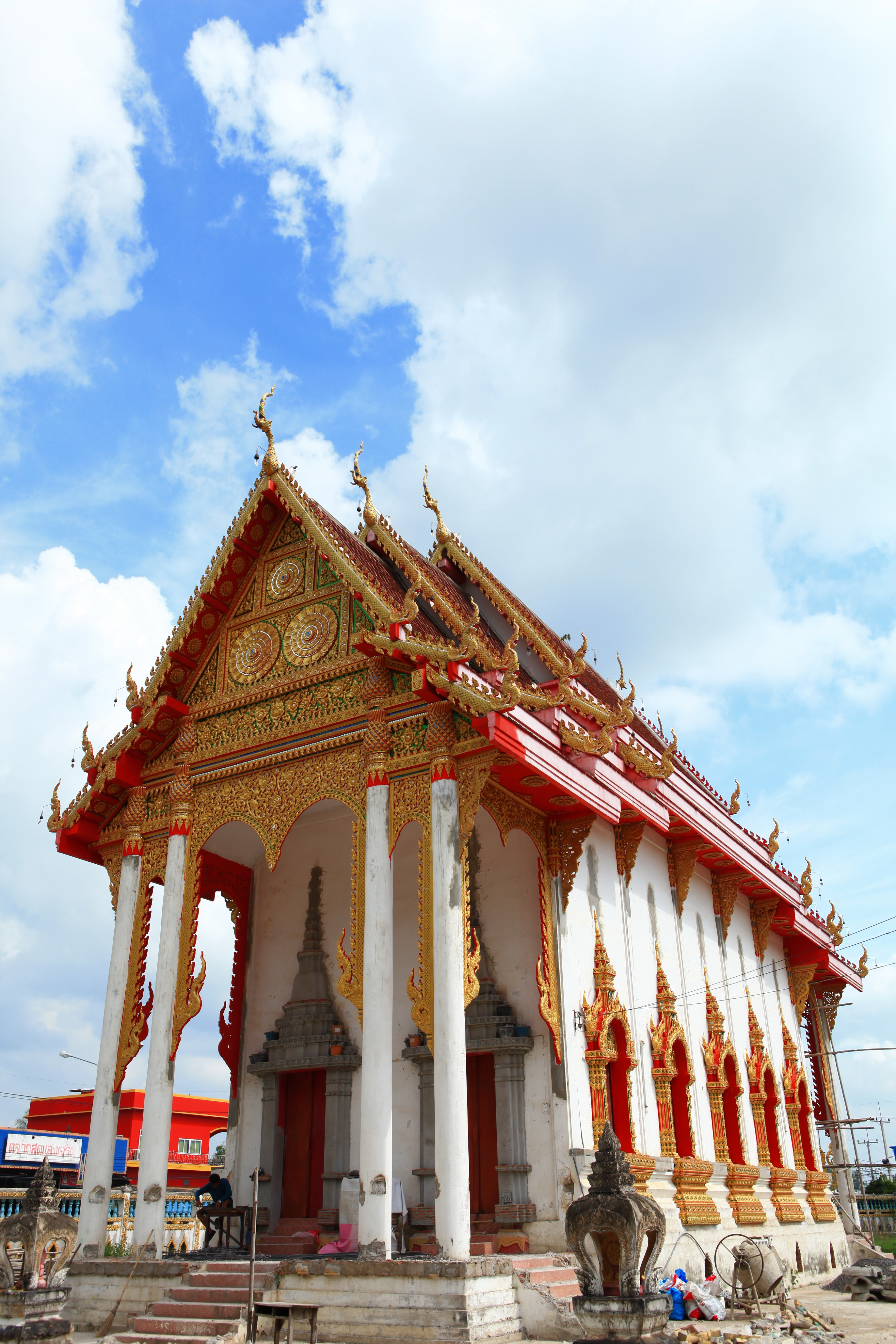 วัดทุ่งสนุ่นรัตนาราม